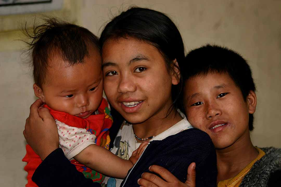 Sikkim Kids